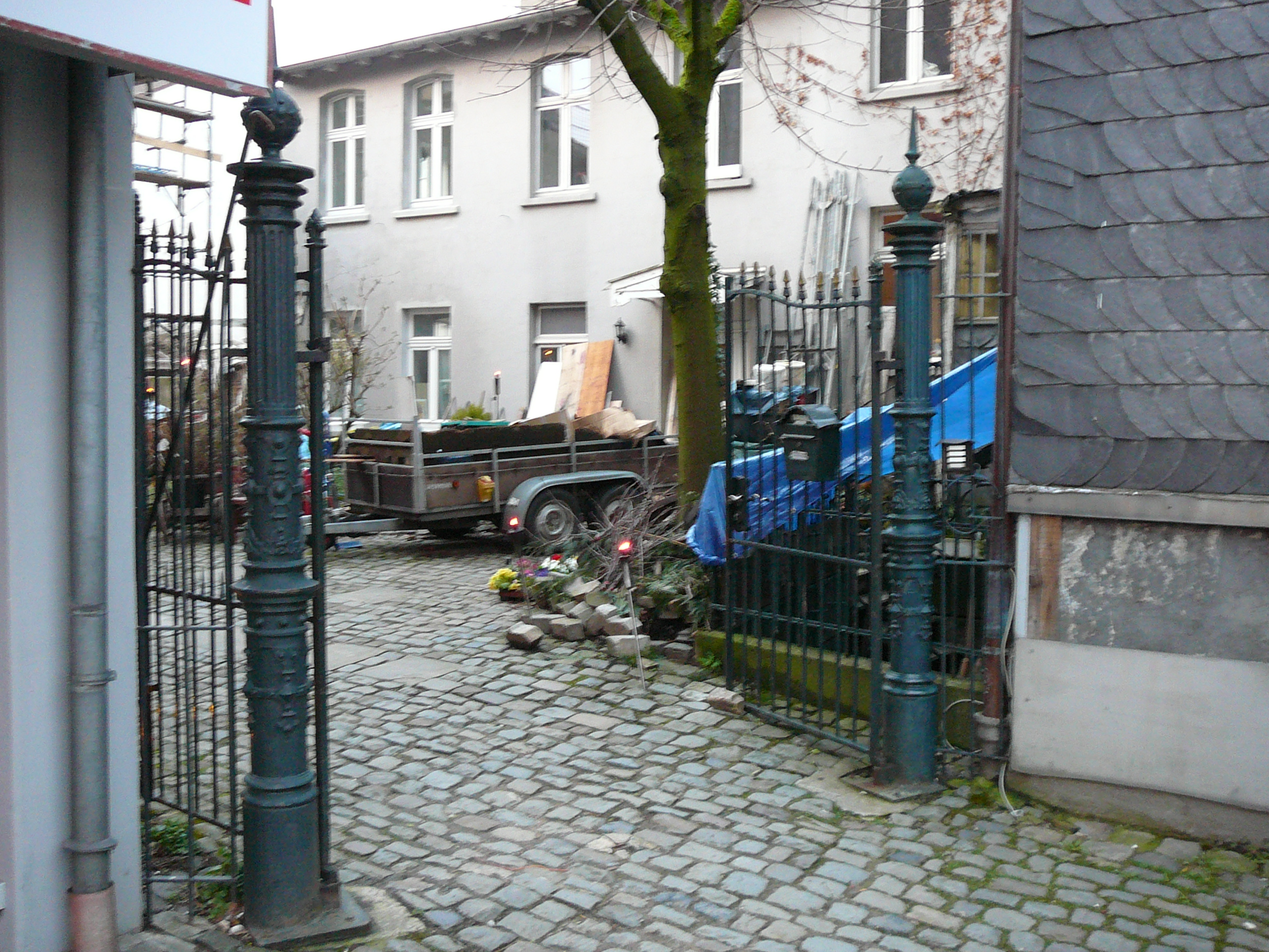 Friedrich-Engels-Allee, Wuppertal